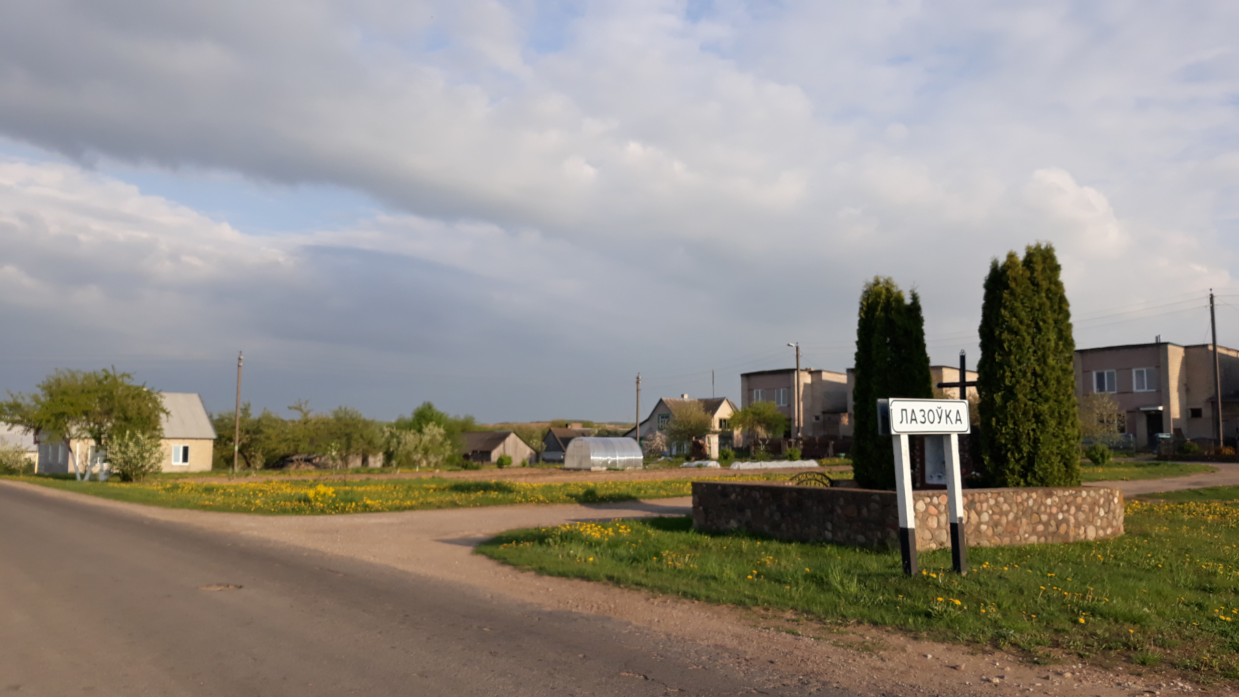 Краявід вёскі